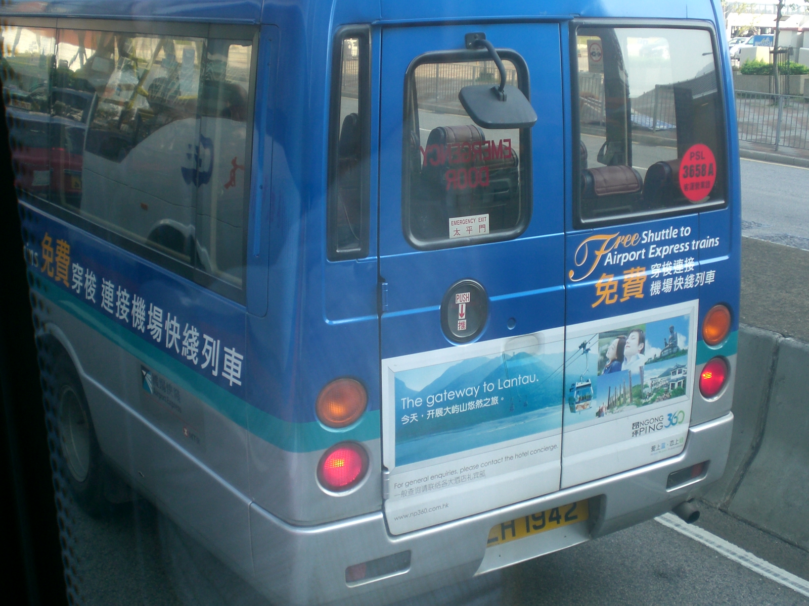 機場快綫穿梭巴士